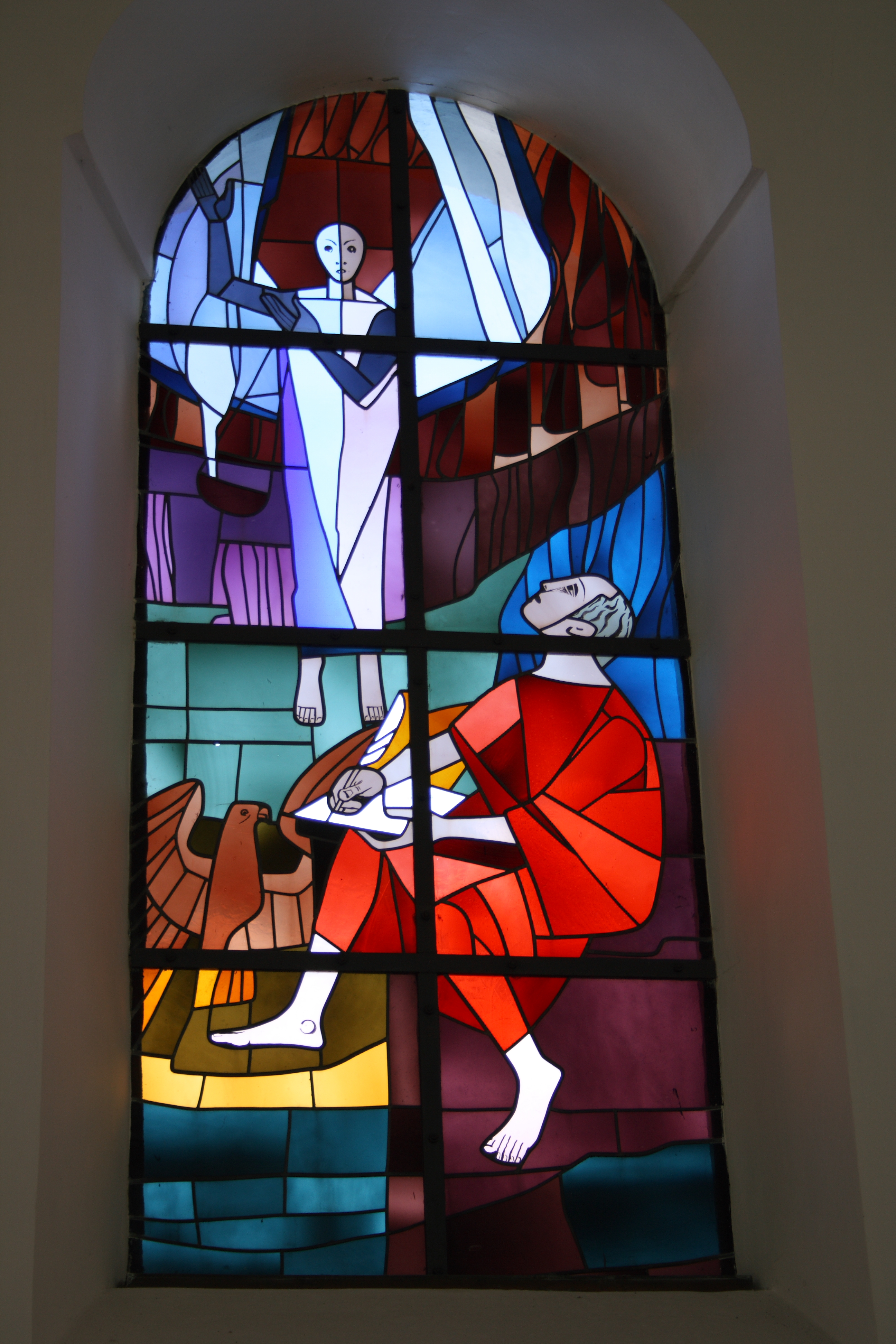 Katholische Pfarrkirche St. Johannes Evangelist in Altenberg (Gemeinde Syrgenstein) im Landkreis Dillingen an der Donau, Chorfenster mit der Darstellung des Johannes, des Verfassers der Apokalypse, auf der Insel Patmos, der von einem Engel angewiesen wird, die Offenbarung zu schreiben, neben ihm ein Adler, das Symbol des Evangelisten Johannes